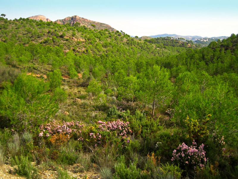 Bosc a la Serra Calderona, País Valencià